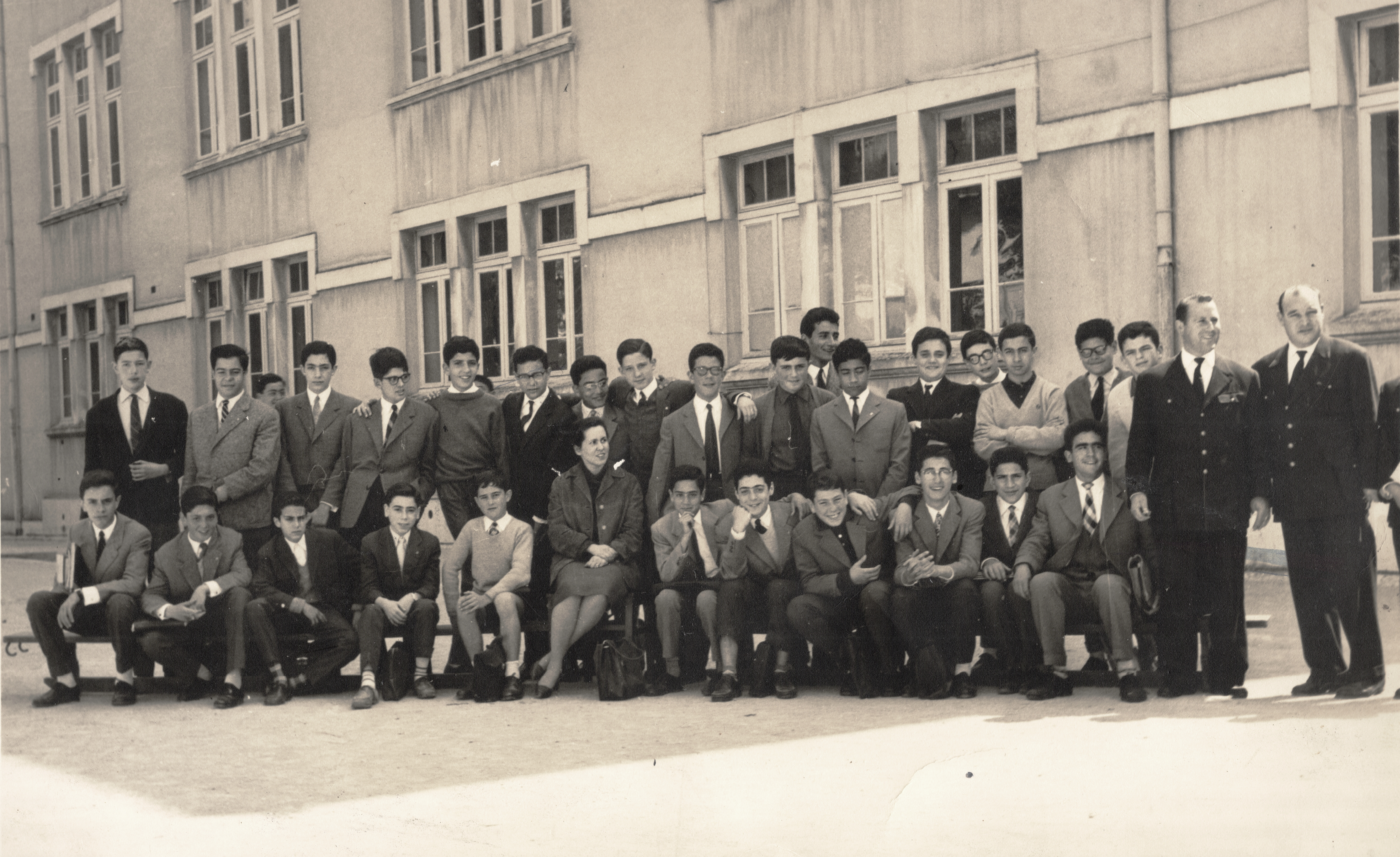 Iolanda Lima, professora de Matemática, com turma do Liceu Pedro Nunes - Lisboa, Portugal 1961